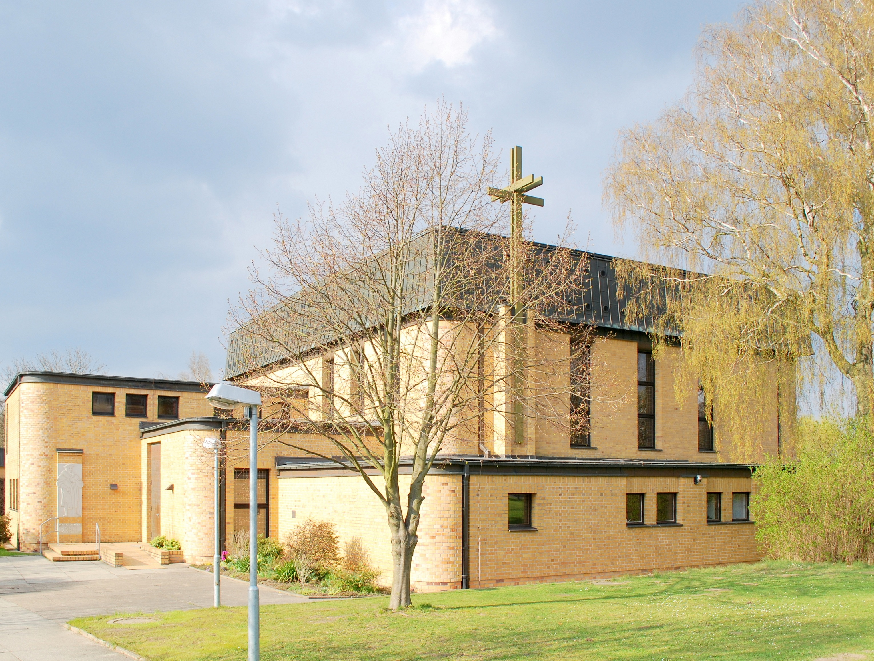 Die St. Thomas Morus Kirche in Rostock, Stadtteil Evershagen. Sie ist ein katholisches & evangelischen Gotteshaus. Ehemaliger Pastor der Gemeinde ist u.a. Joachim Gauck (BP).